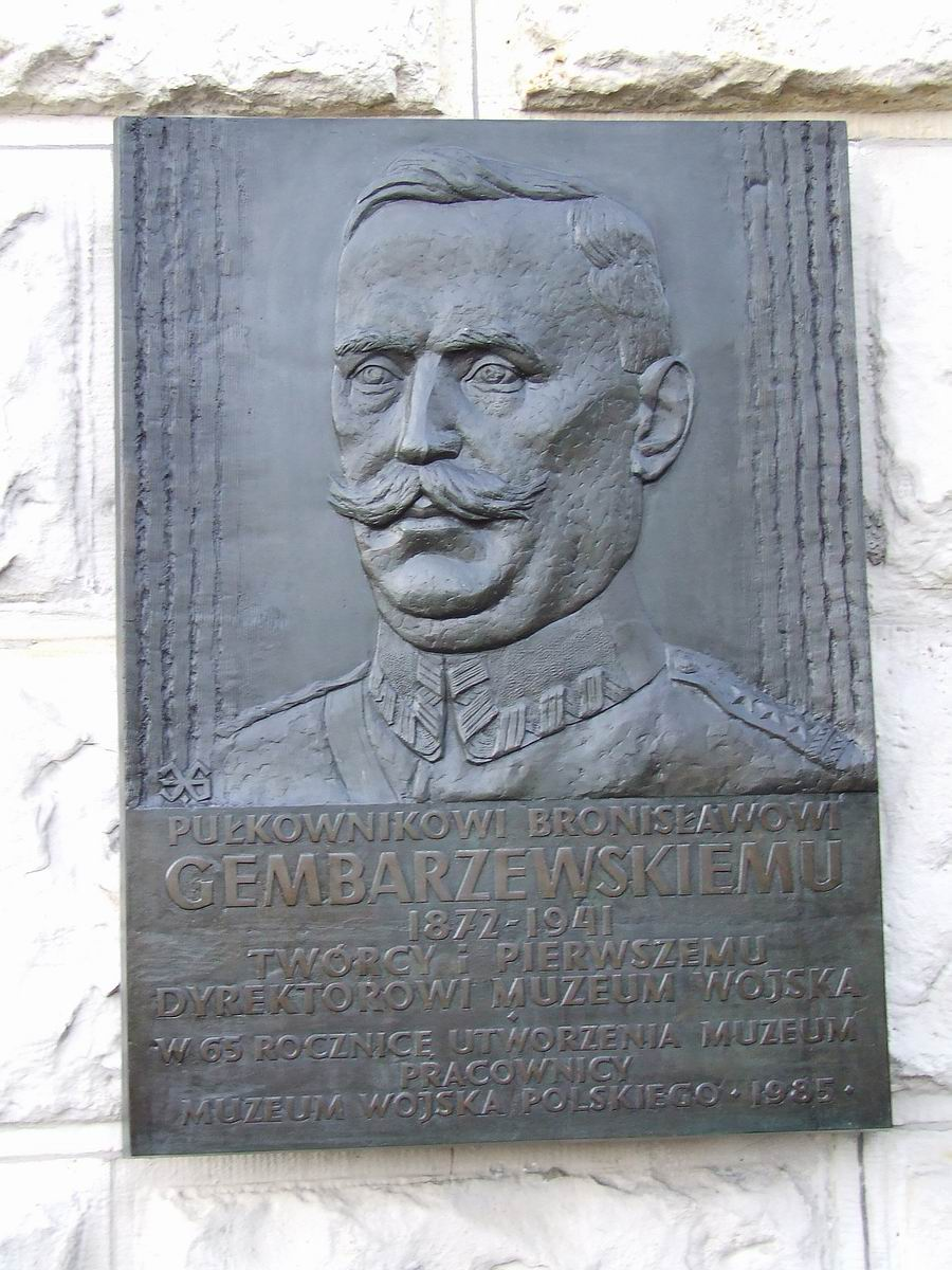 płk. Bronisław gembarzewski, tablica na ścianie Muzeum WP